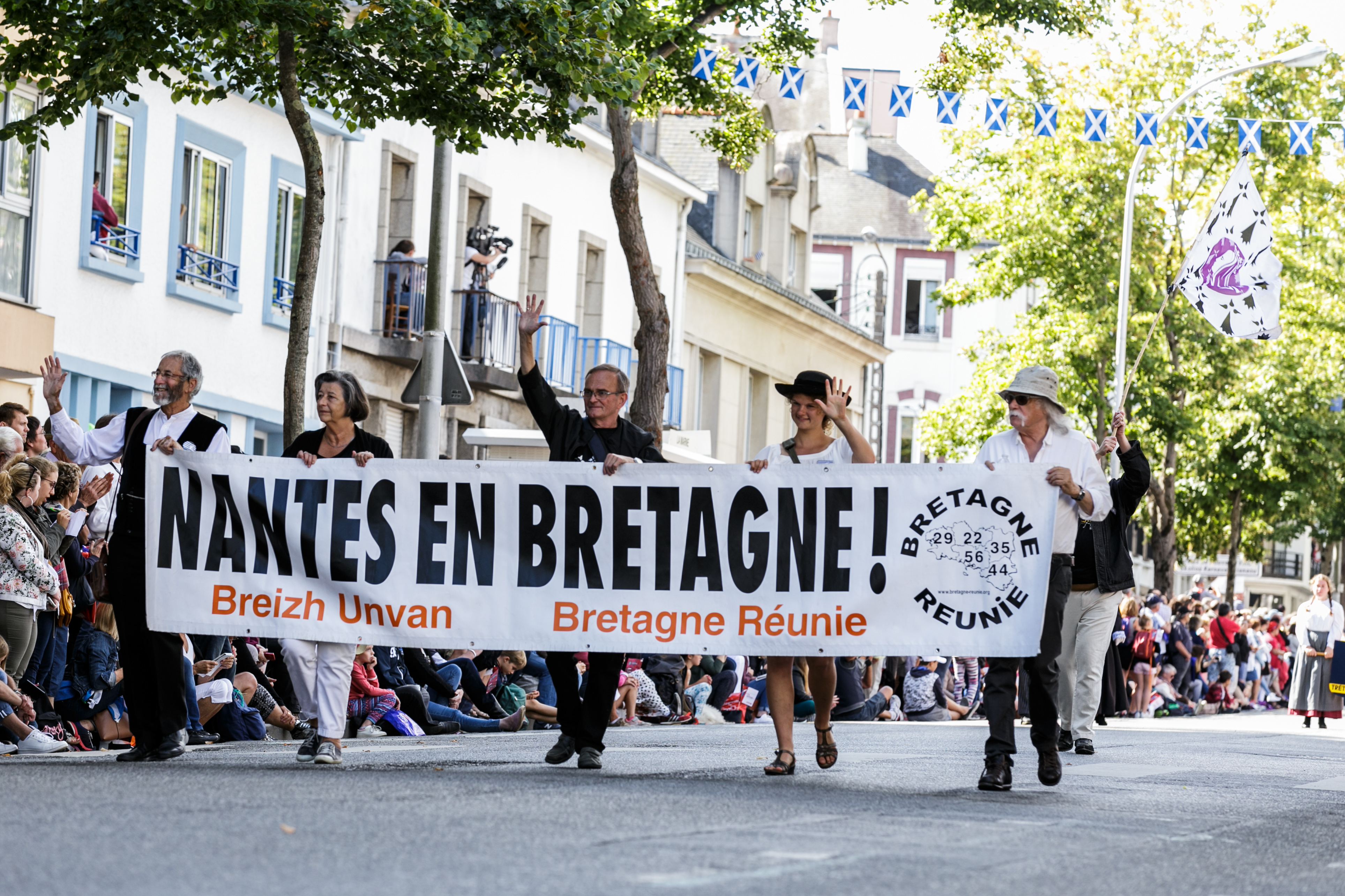 Festival Interceltique de Lorient 2017 - Grande parade des nations celtes - Bretagne Réunie